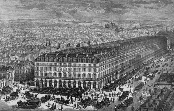 Les Grands Magasins du Louvre en 1877 Domaine public Gravure BNF